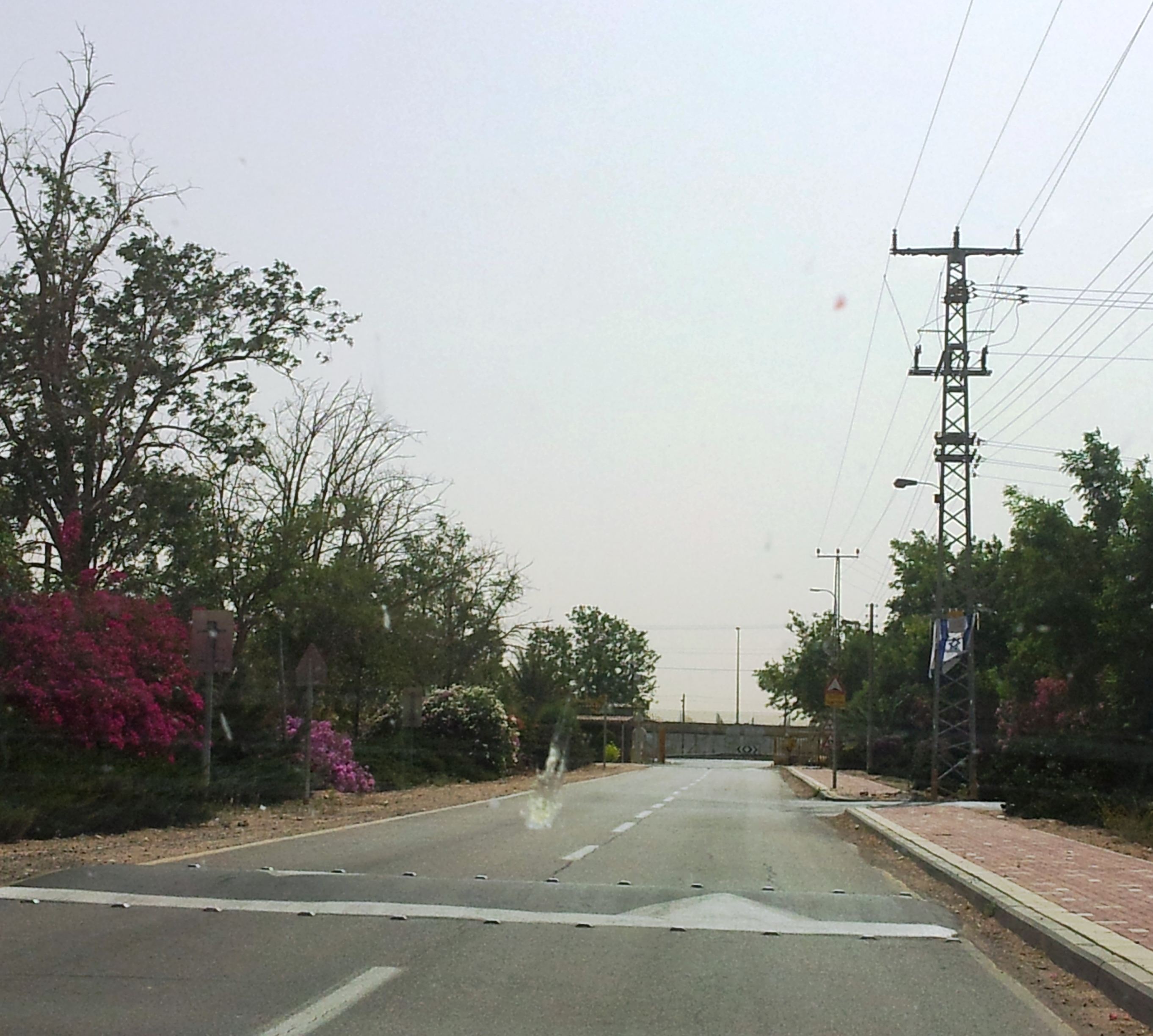 Sdei Avraham, Israel שדי אברהם, ישראל רחוב בכניסה למושב שדי אברהם